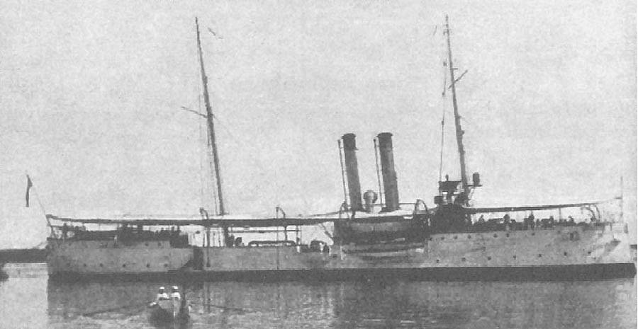 das venezulanische Kanonenboot Mariscal Sucre Lizenz